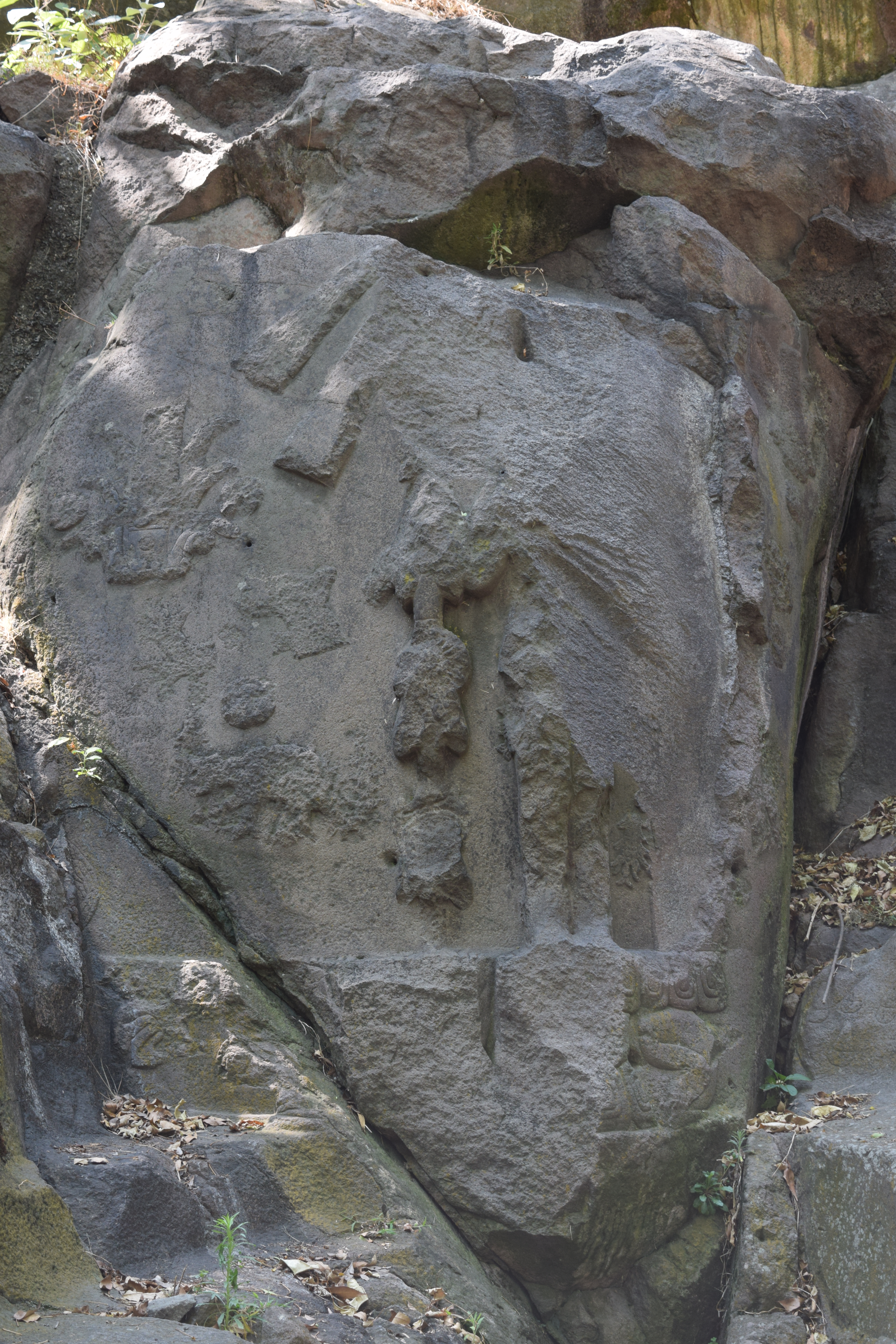 Petroglifo de Moctezuma Xocoyotzin